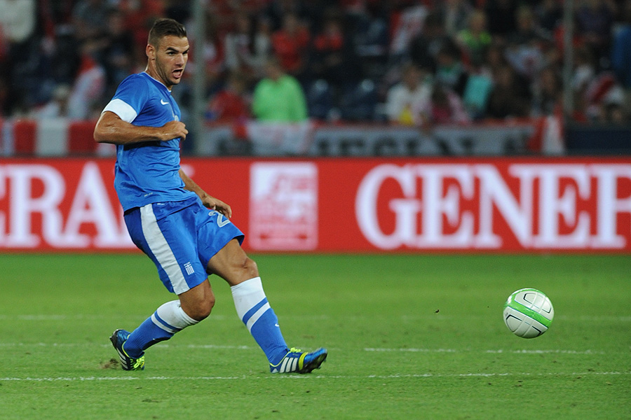 Freundschaftliches Länderspiel Österreich - Griechenland am 14. August 2013 in Salzburg: Panagiotis Tachtsidis